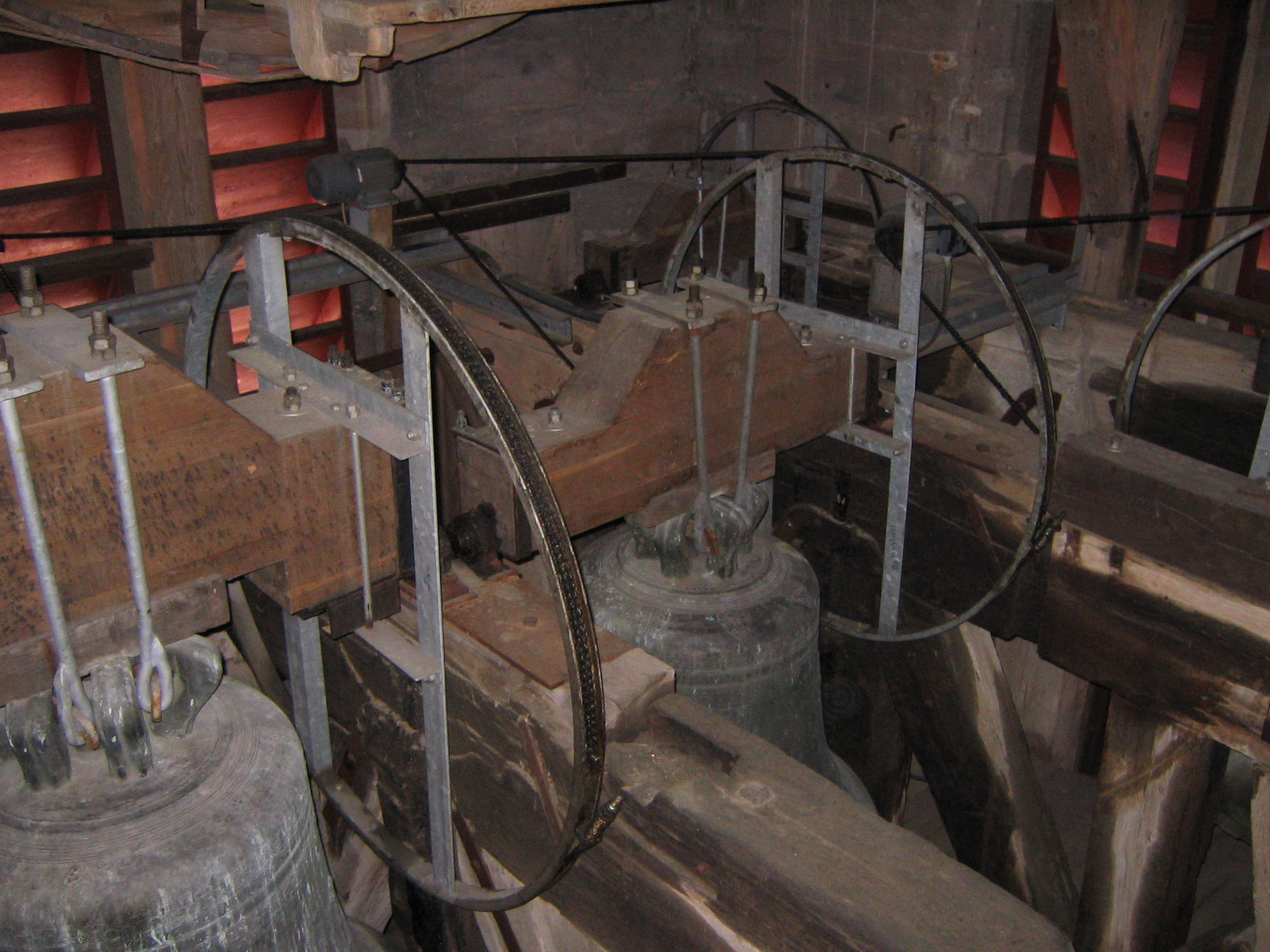 Glockenstuhl im Münster St. Georg zu Dinkelsbühl